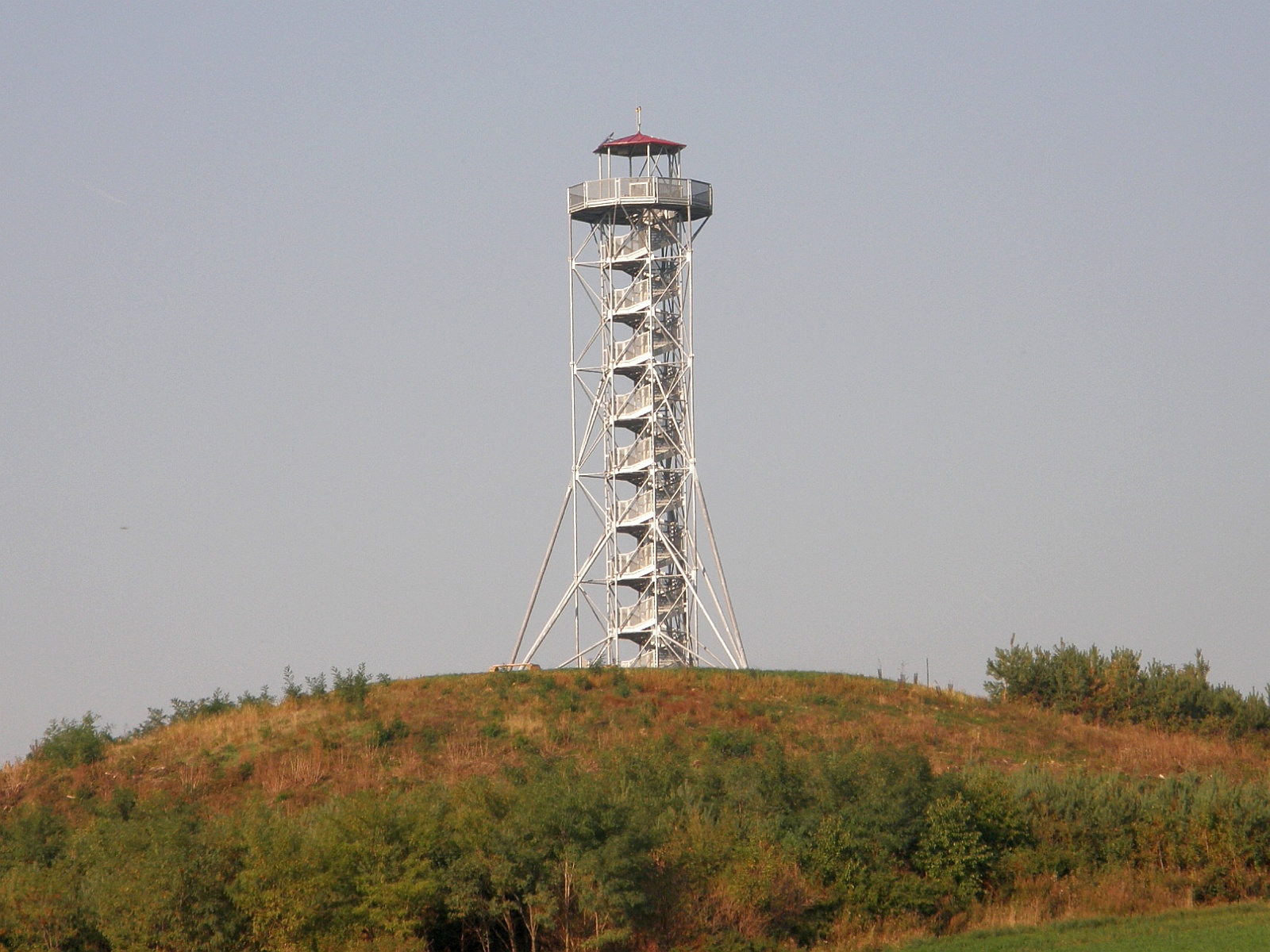 Rozhledna Chocholík u Drnovic v okrese Vyškov